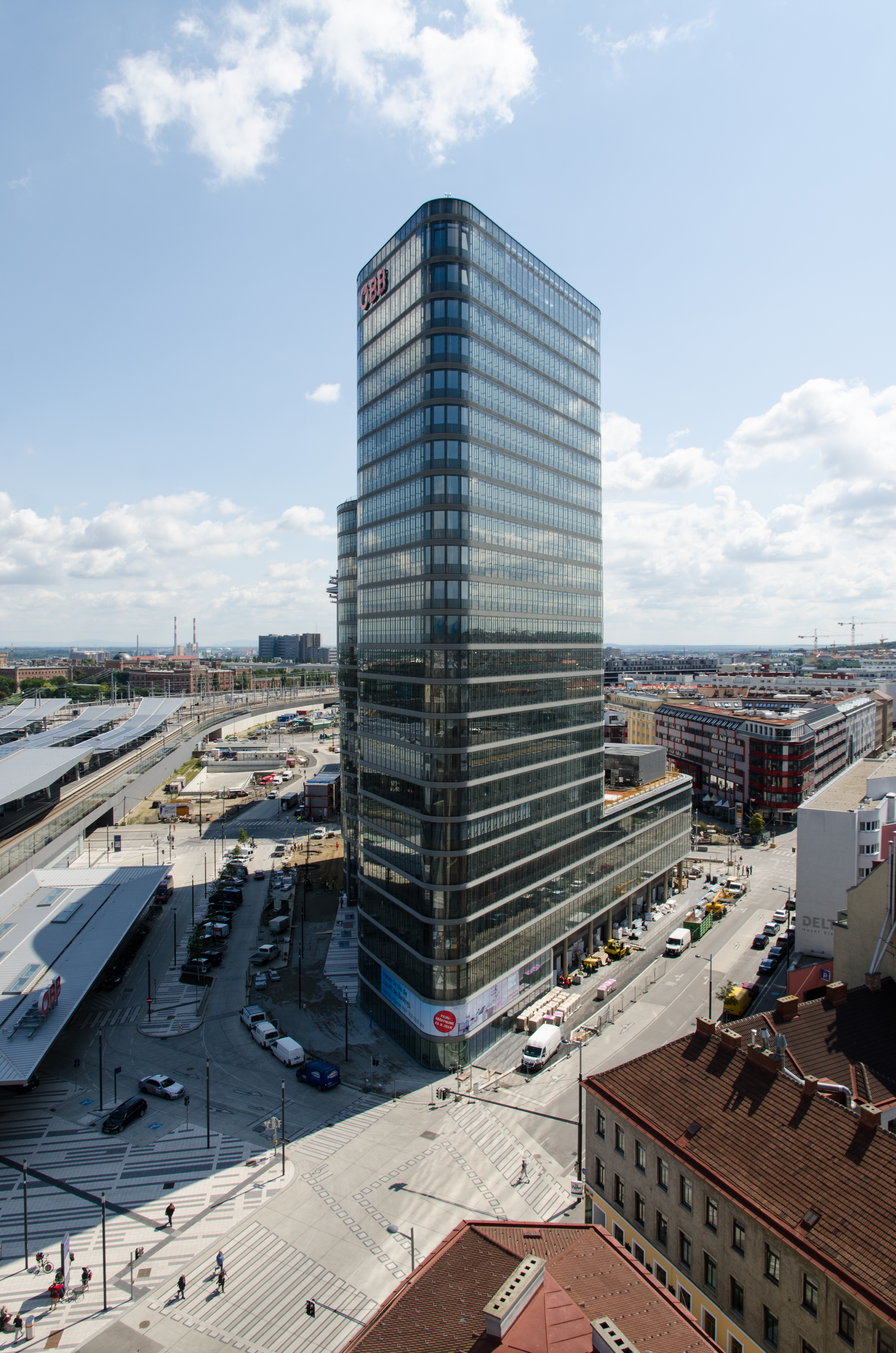 DSC_3562_LR